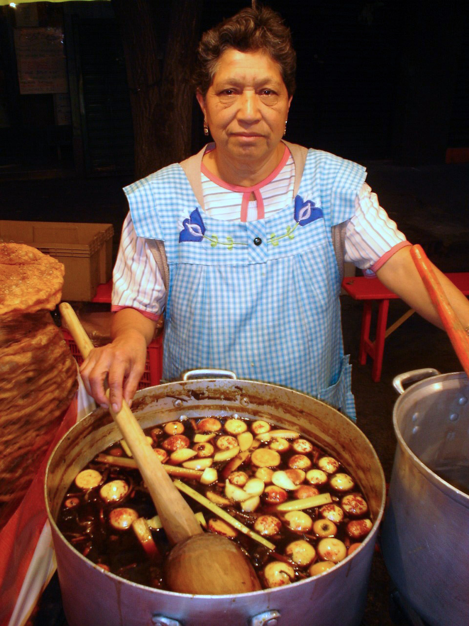 SE MUESTRA COMO YA ESTA PREPARADO EL PONCHE.